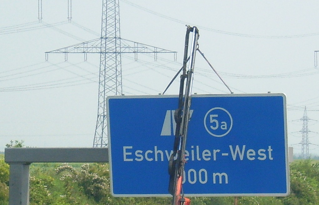 Neues Autobahnausfahrtschild Eschweiler-West auf der A 4 beim Aufhängen